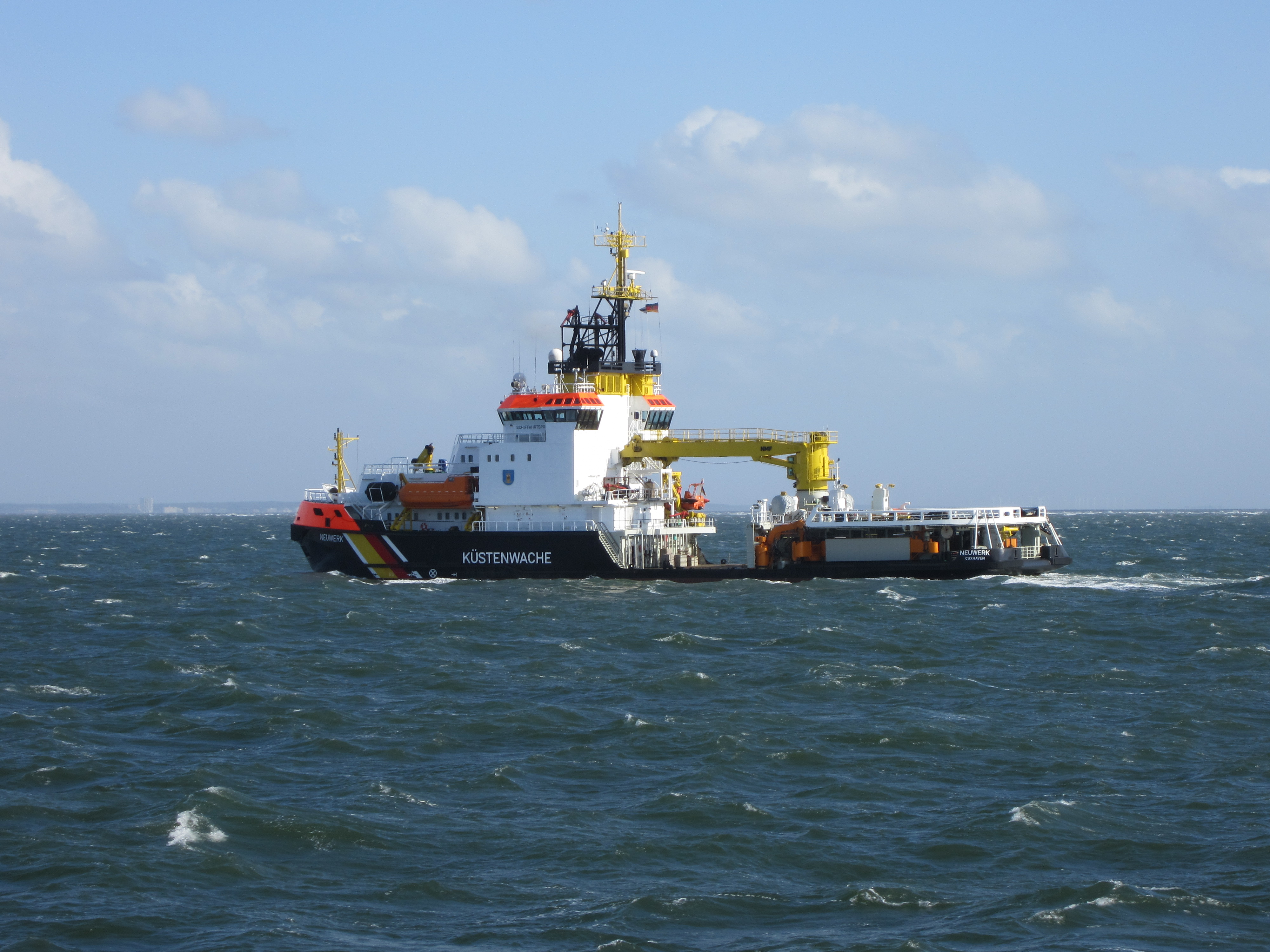 MS Neuwerk auf dem Weg nach Cuxhaven